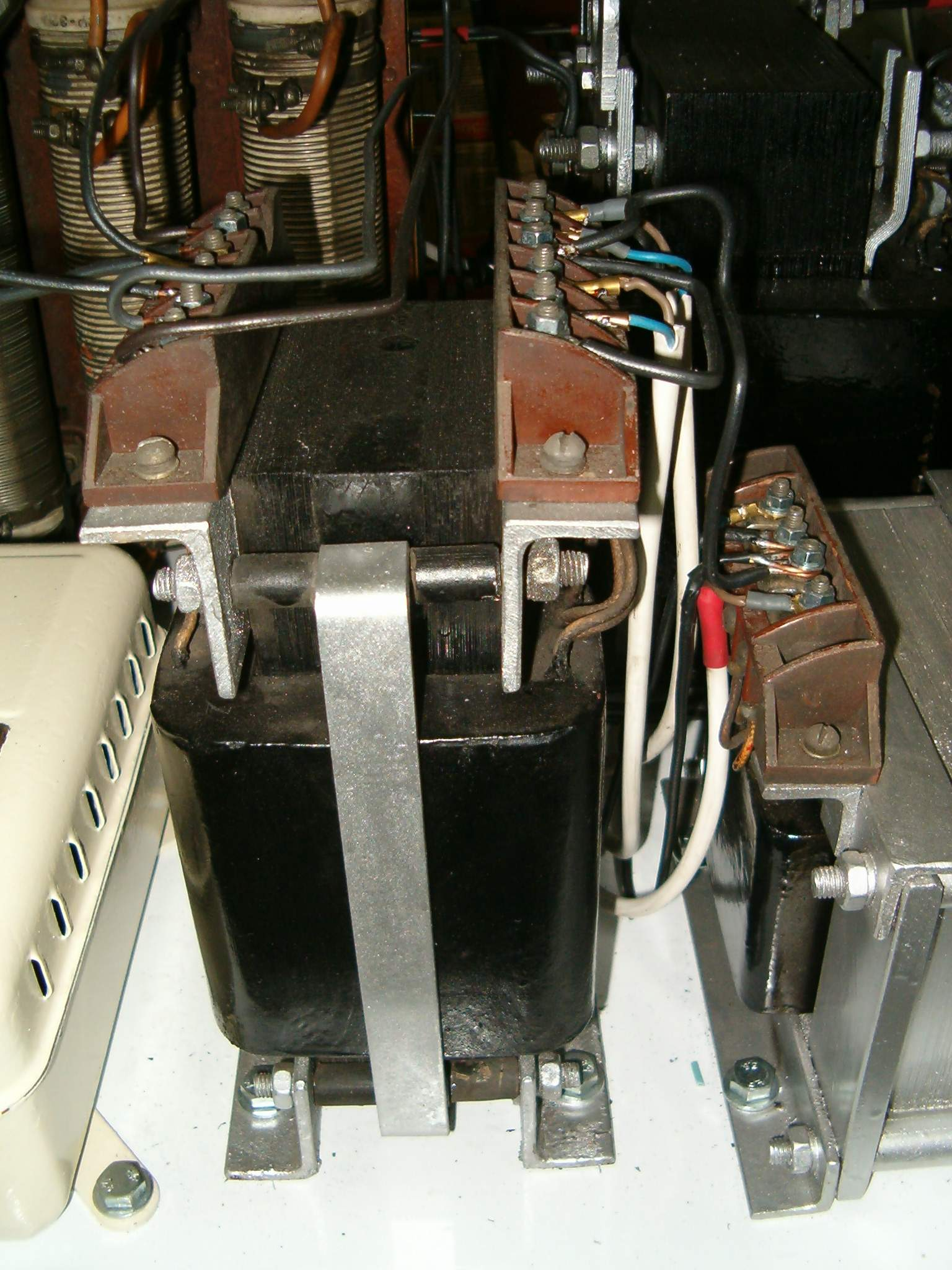 Amplistat typu AW-3A. (Lokomotywa spalinowa ST-44).